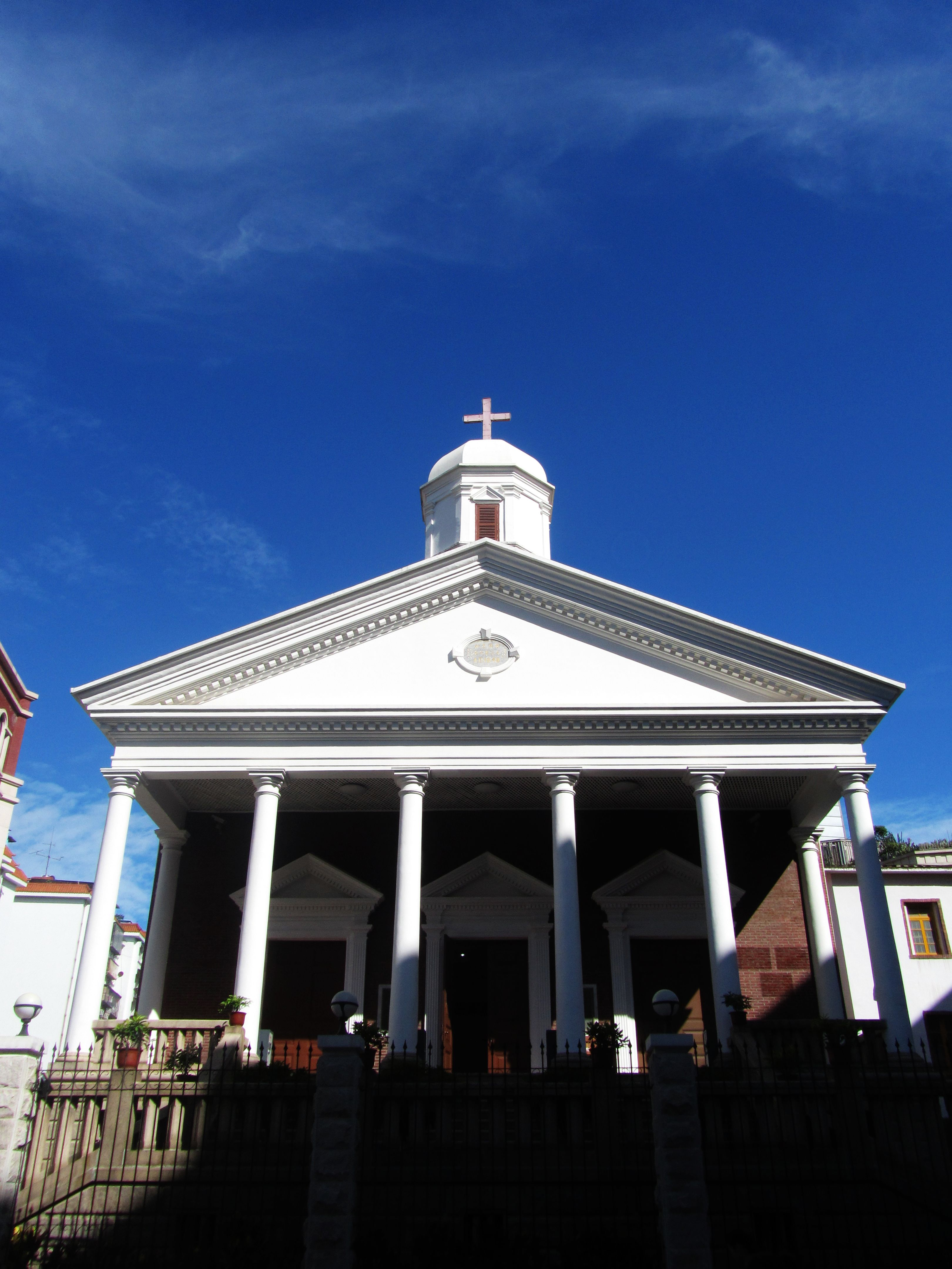 厦门新街礼拜堂，北面。